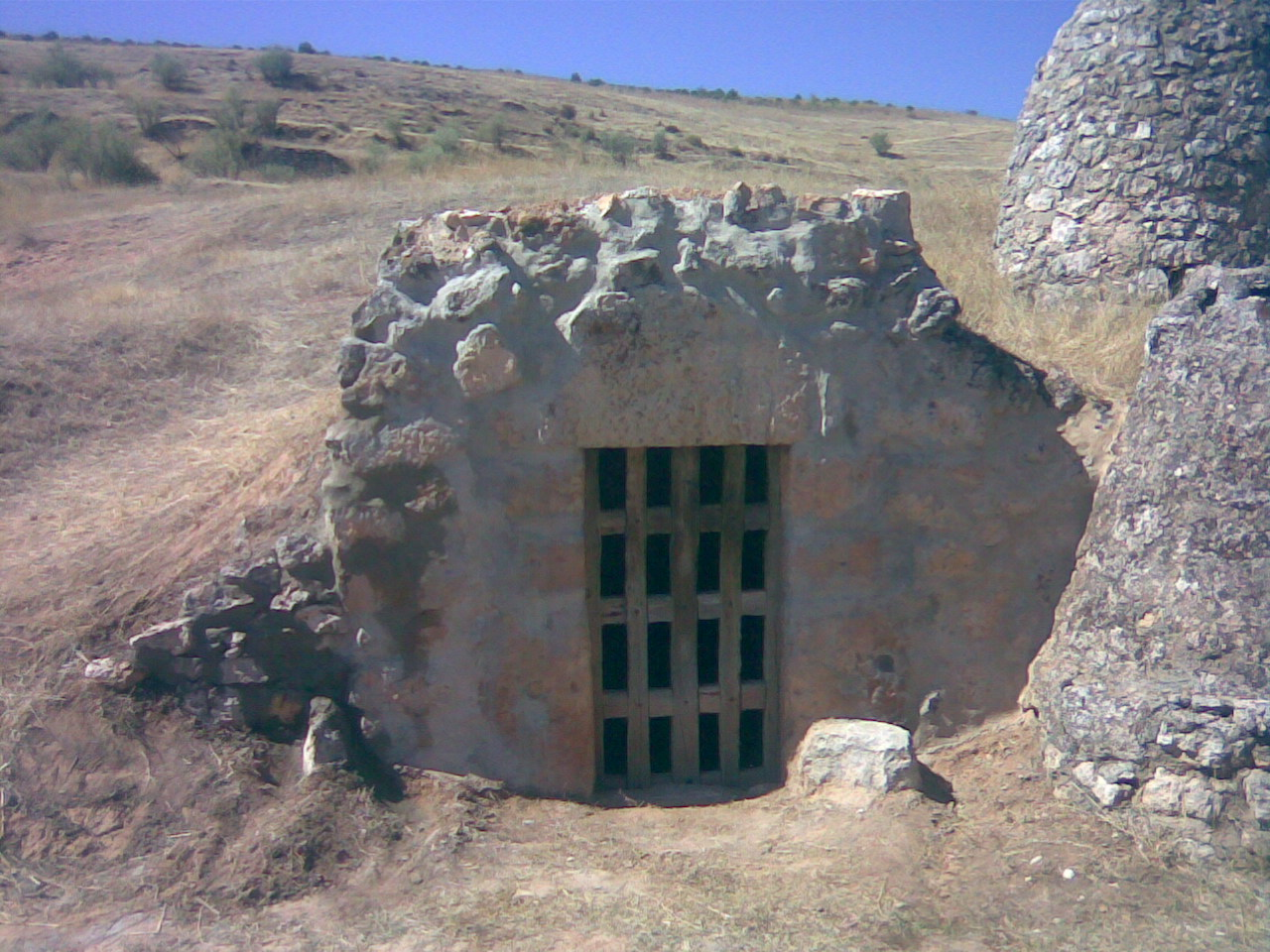 Bodegas familiares en San Martín de Rubiales (Burgos, España)